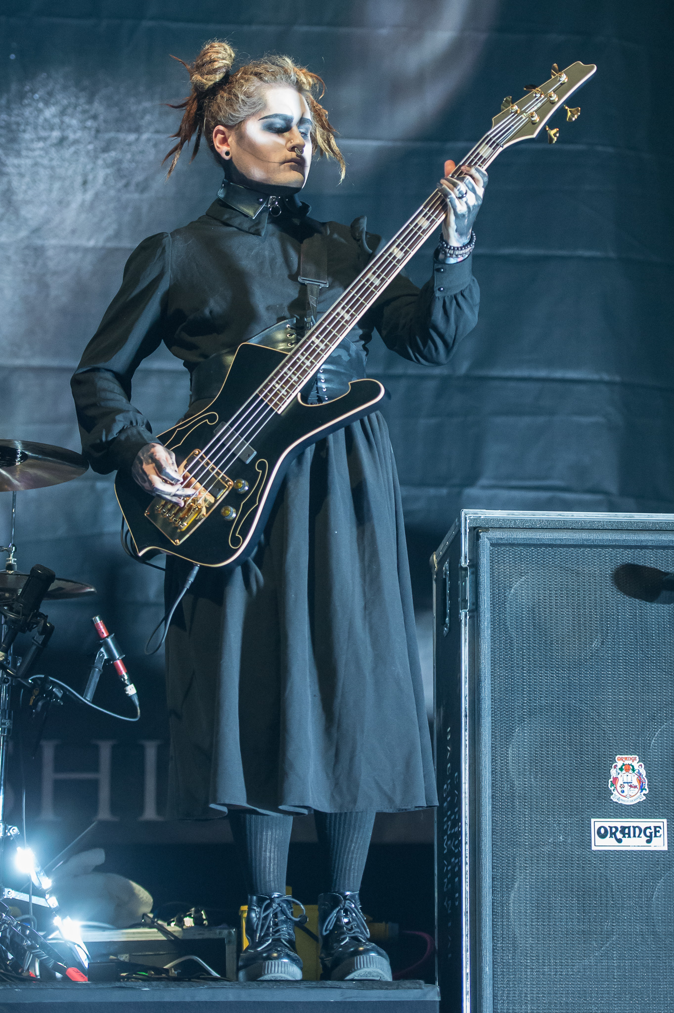 ARGO-Konzerte,Devin „Ghost“ Sola,Engelbert Strauss Alternarena,Konzert,Livekonzert,Livemusik,Motionless in White,Musik,RiP,Rock im Park 2017